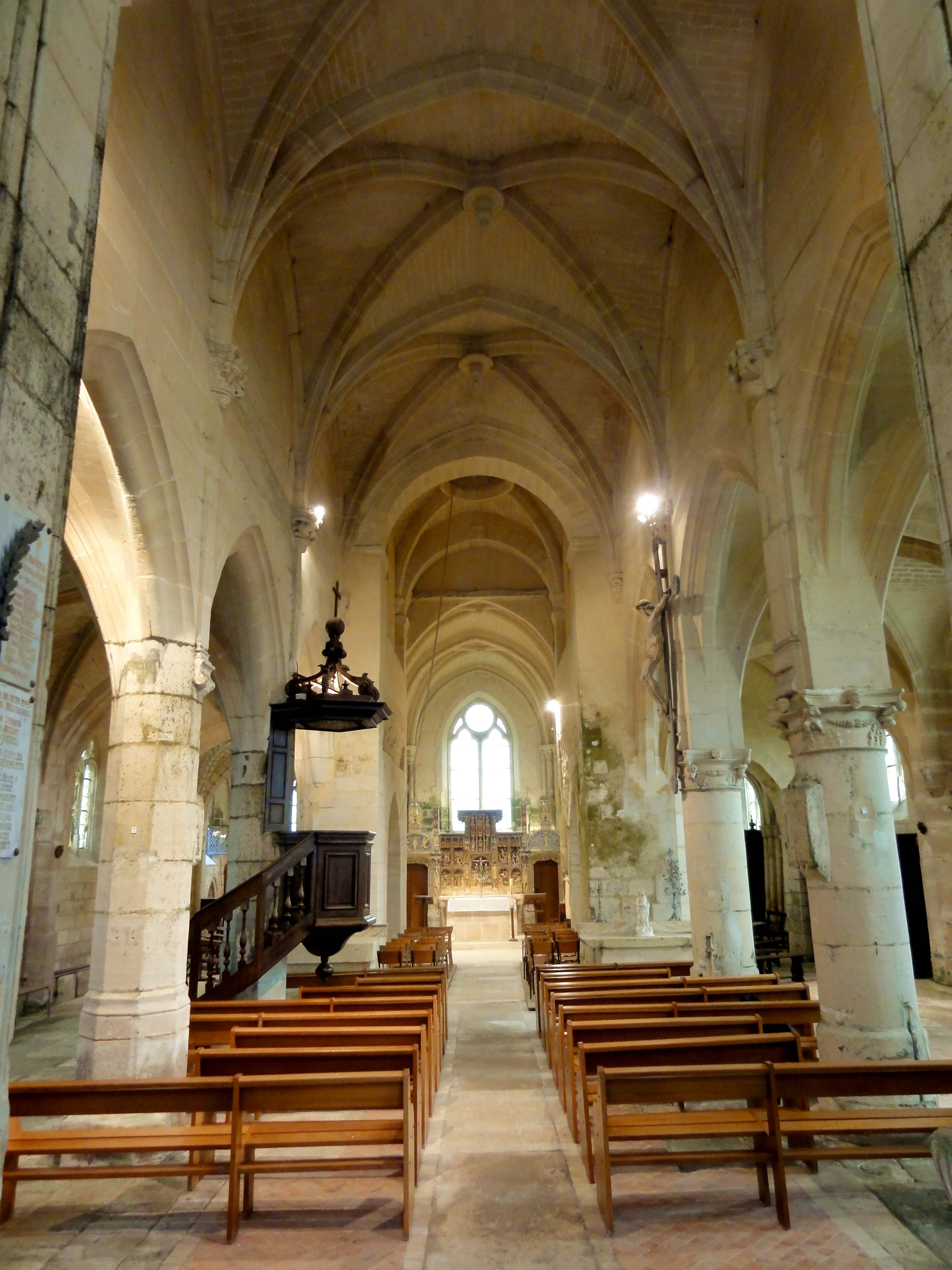 Intérieur de l'église - voir titre.